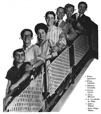 La Familia Falcon. TV Argentina, Canal 13. Publicidad gráfica de Canal 13 de 1962. De arriba a abajo los actores son: 1) Pedro Quartucci; 2) Elina Colomer; 3) Roberto Escalada; 4) Emilio Conte; 5) Silvia Merlino; 6) Alberto Fernández de Rosa; 7) José Luis Mazza.